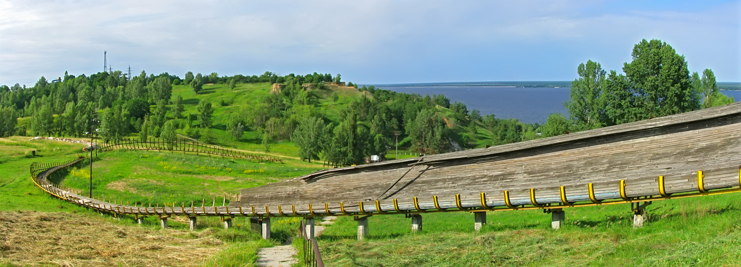 «Хвощ великий», Вишгородський район, Вишгородська міська рада